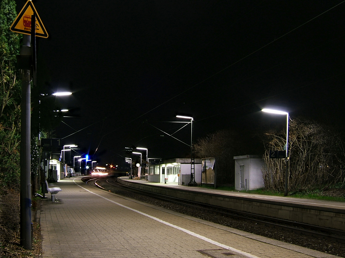 Kernen im Remstal, Deutschland; S-Bahn-Haltestelle in Rommelshausen bei Nacht